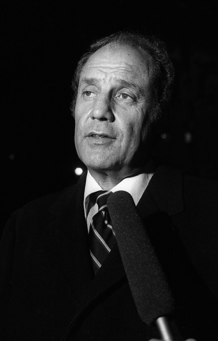 Rabino, formó parte de la CONADEP, defensor de los Derechos Humanos